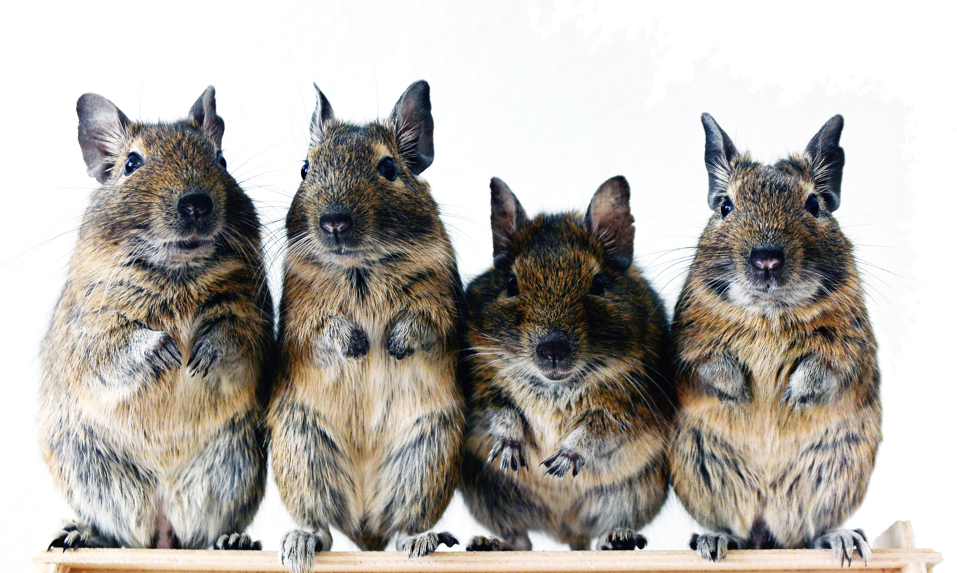 Banda osmáků